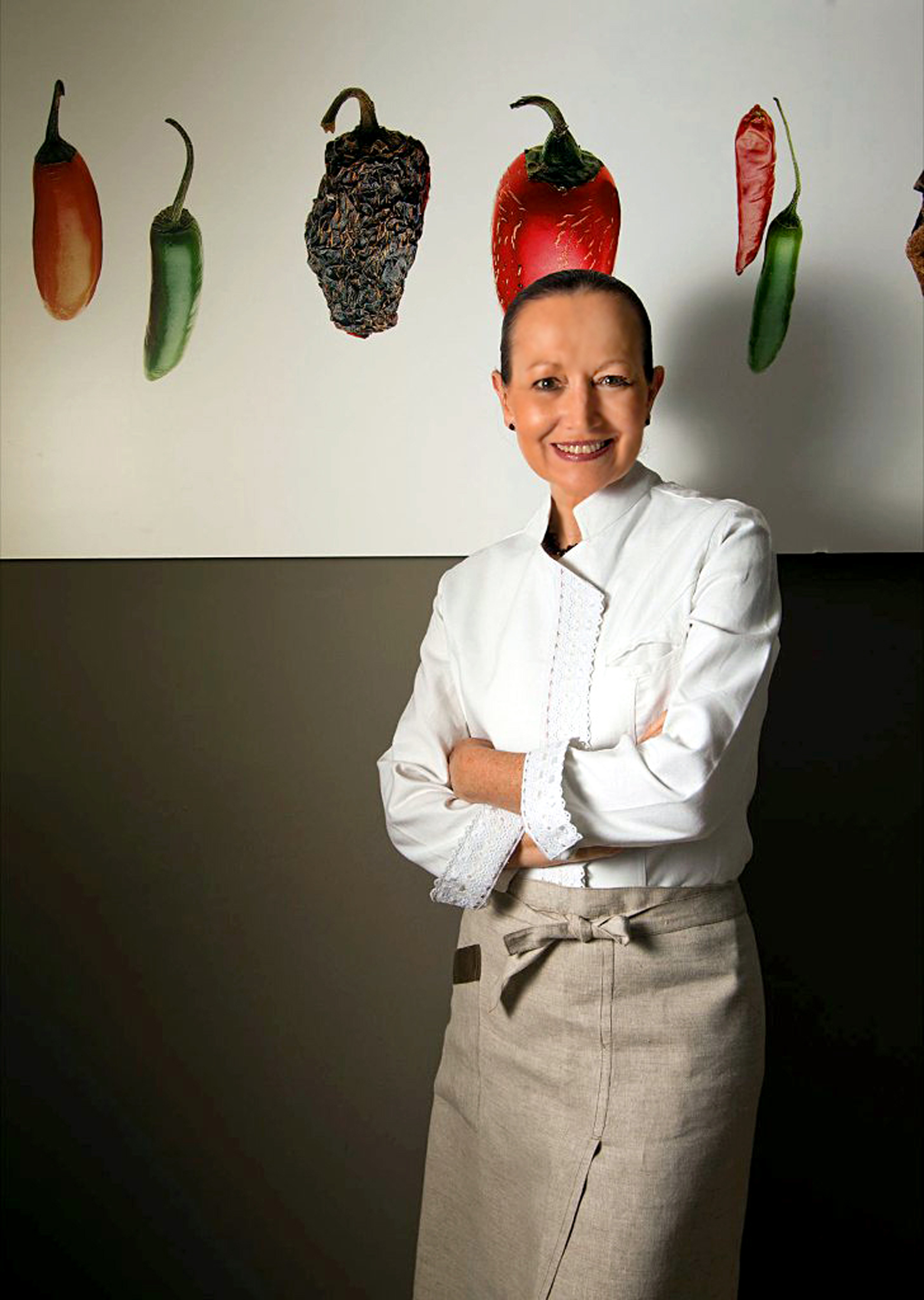 Chef Patricia Quintana en la cocina de las salsas y aderezos Gavilla